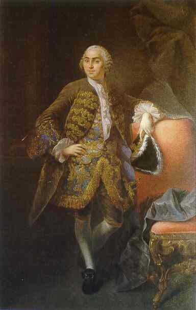 Nikita Akinfiyevich Demidov. Л.Токке. Портрет Никиты Акинфиевича Демидова. 1756-1758 гг. Холст, масло. Русский музей